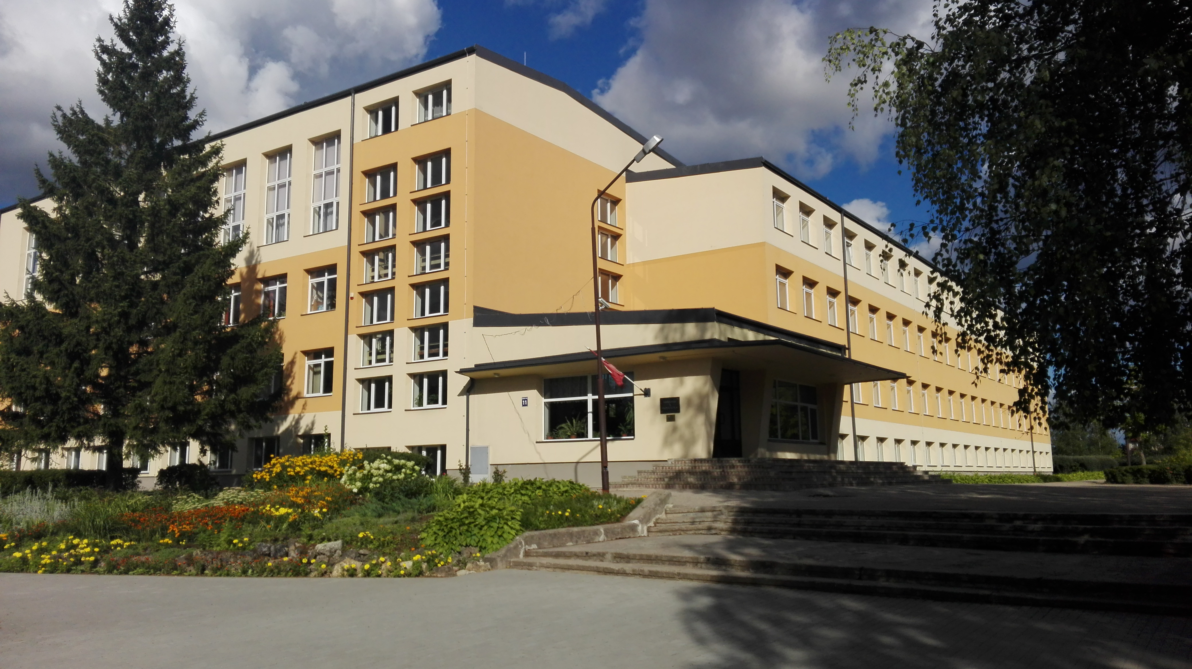 Rēzeknes 5. vidusskola 2016. gadā.